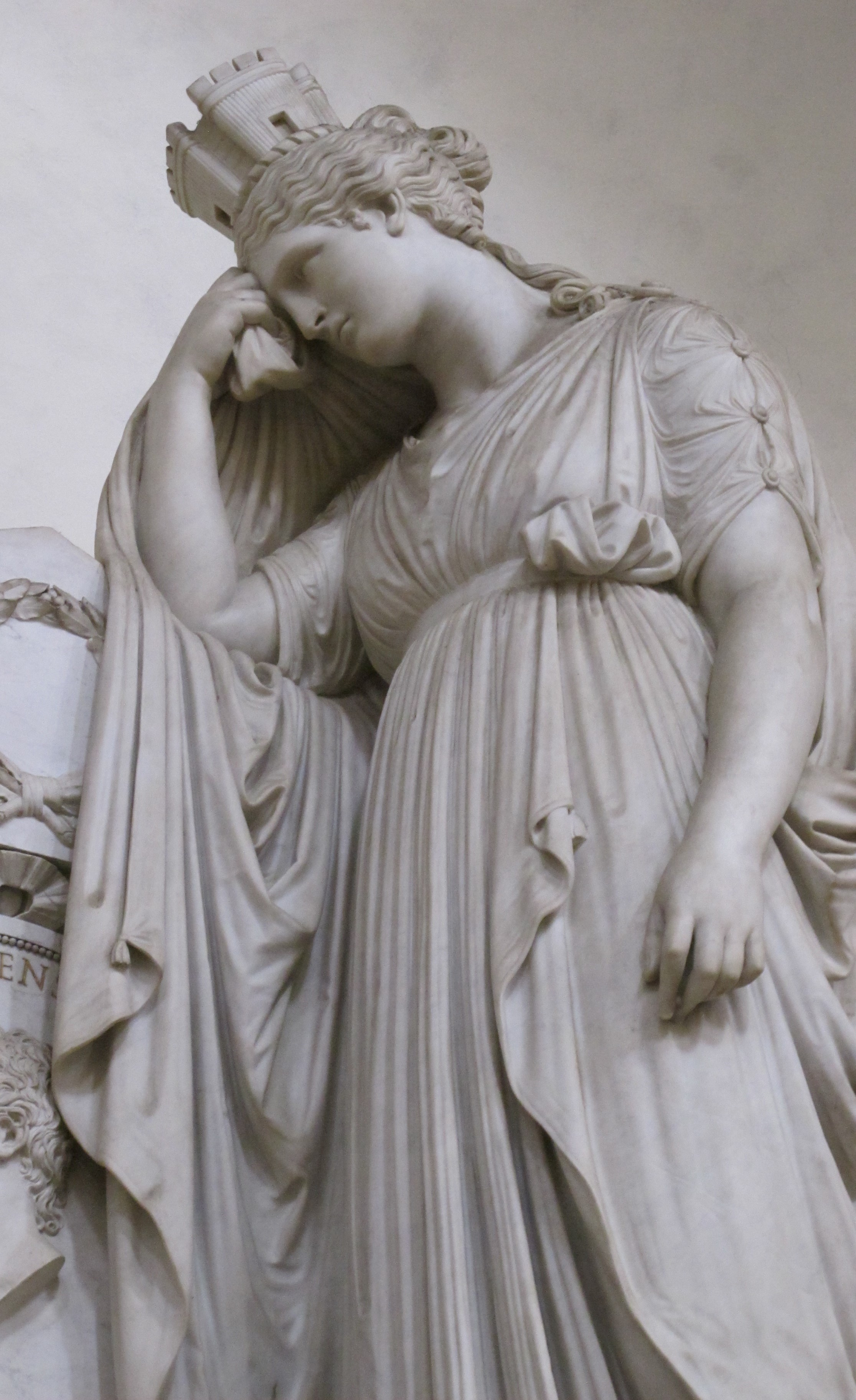 L'Italia turrita in lacrime nel monumento a Vittorio Alfieri